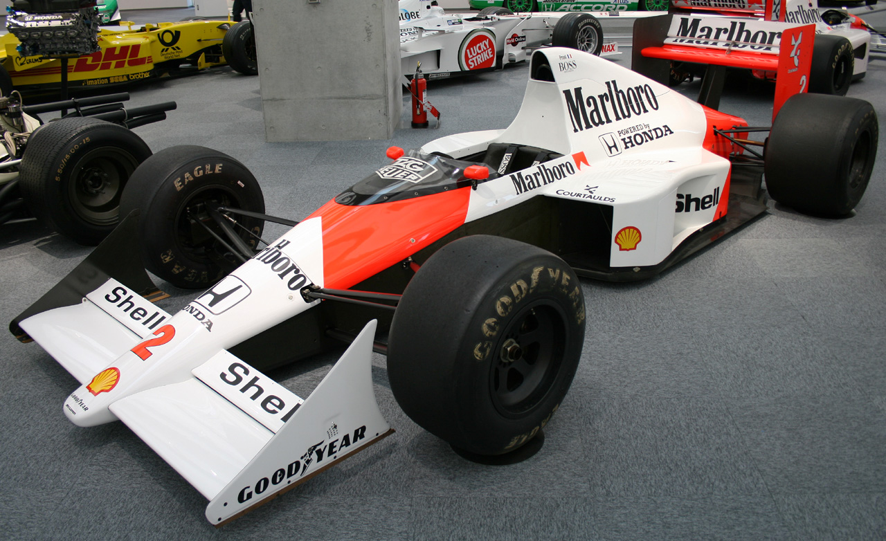 1989 McLaren MP4/5 (#2 Alain Prost)